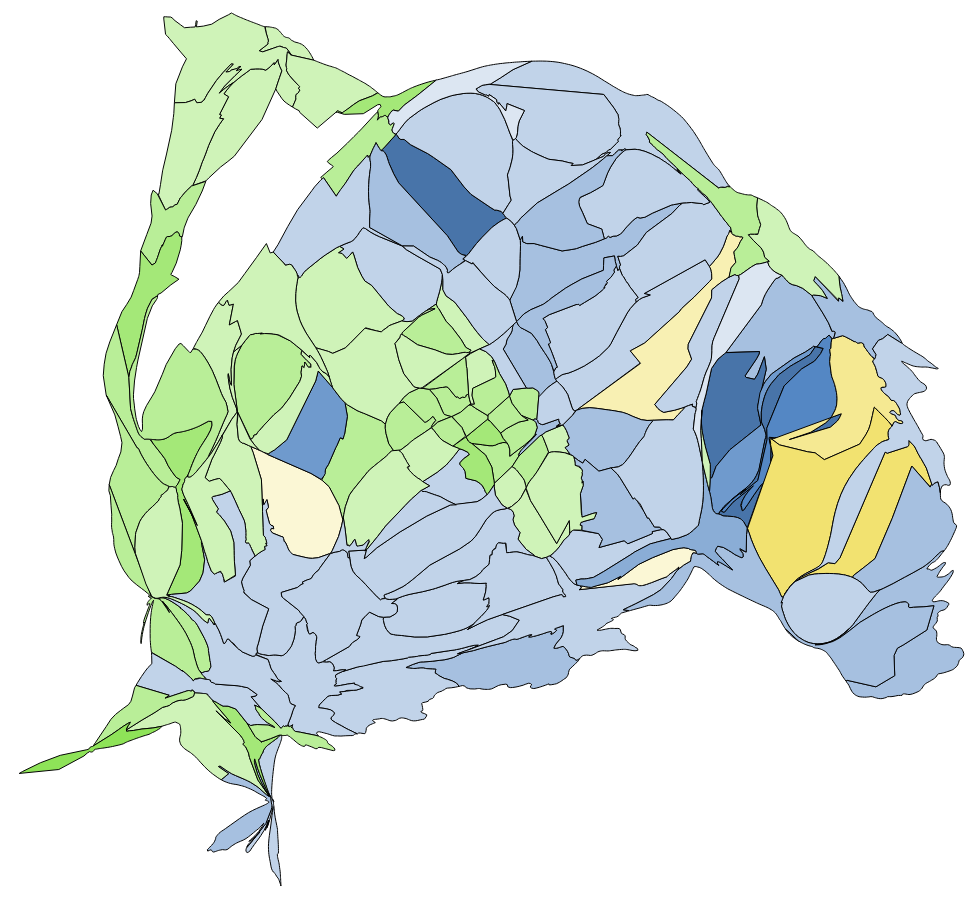 中文（台灣）: 顏色對照表 部分村里因共用投開票所 故圖中部分村里得票為依人口調整後資料